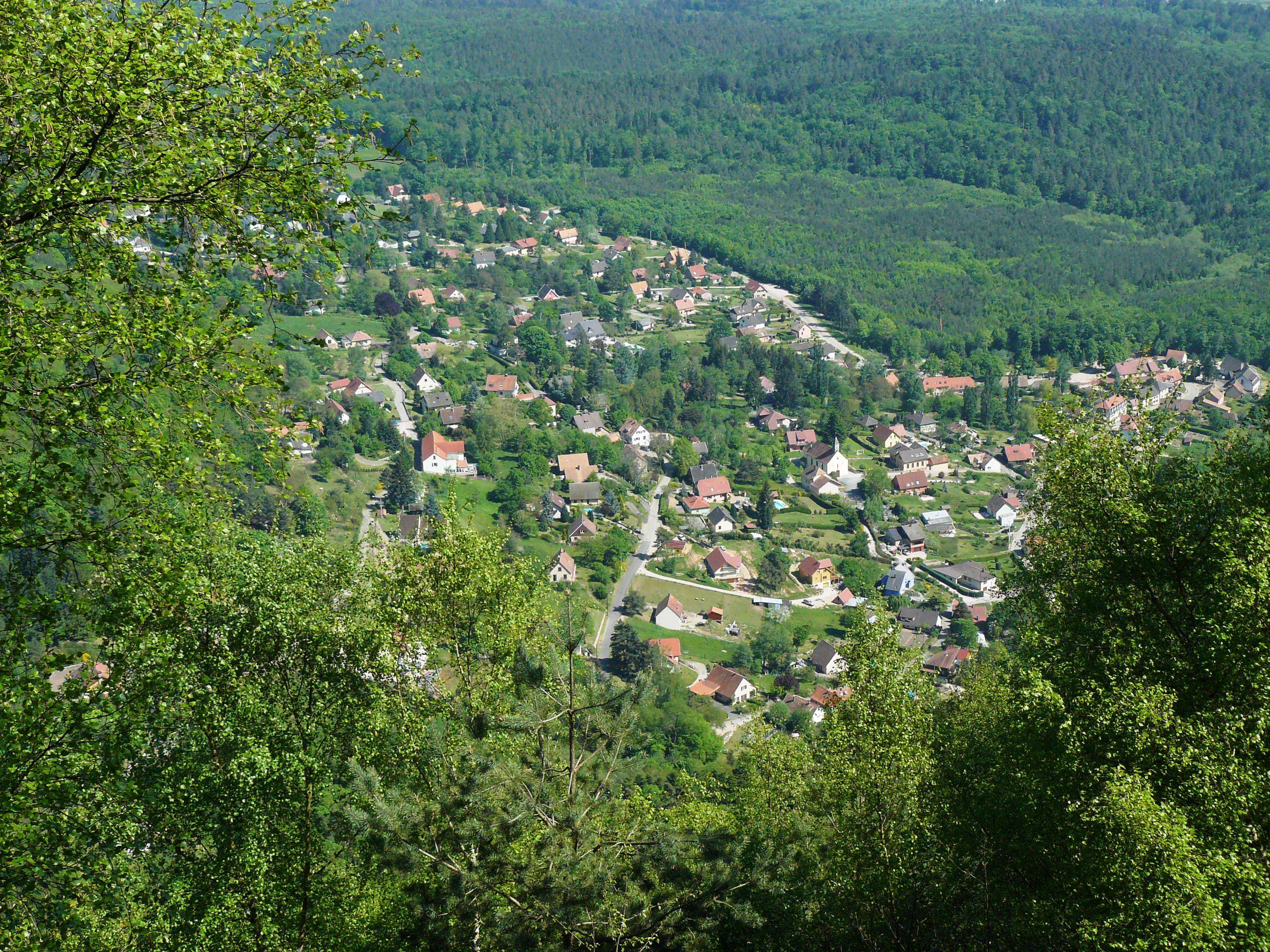 Vue sur La Vancelle depuis le crête du village